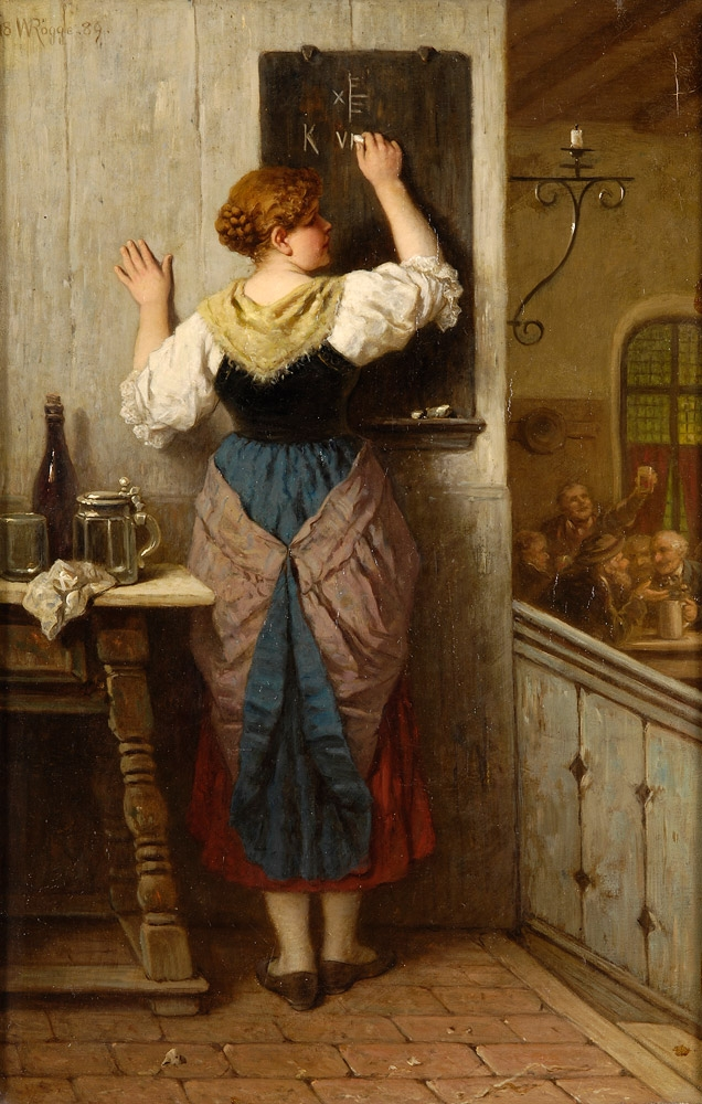 Eine fesche Oberin. Signiert. Datiert 1889. Öl auf Leinwand, 54 x 35 cm